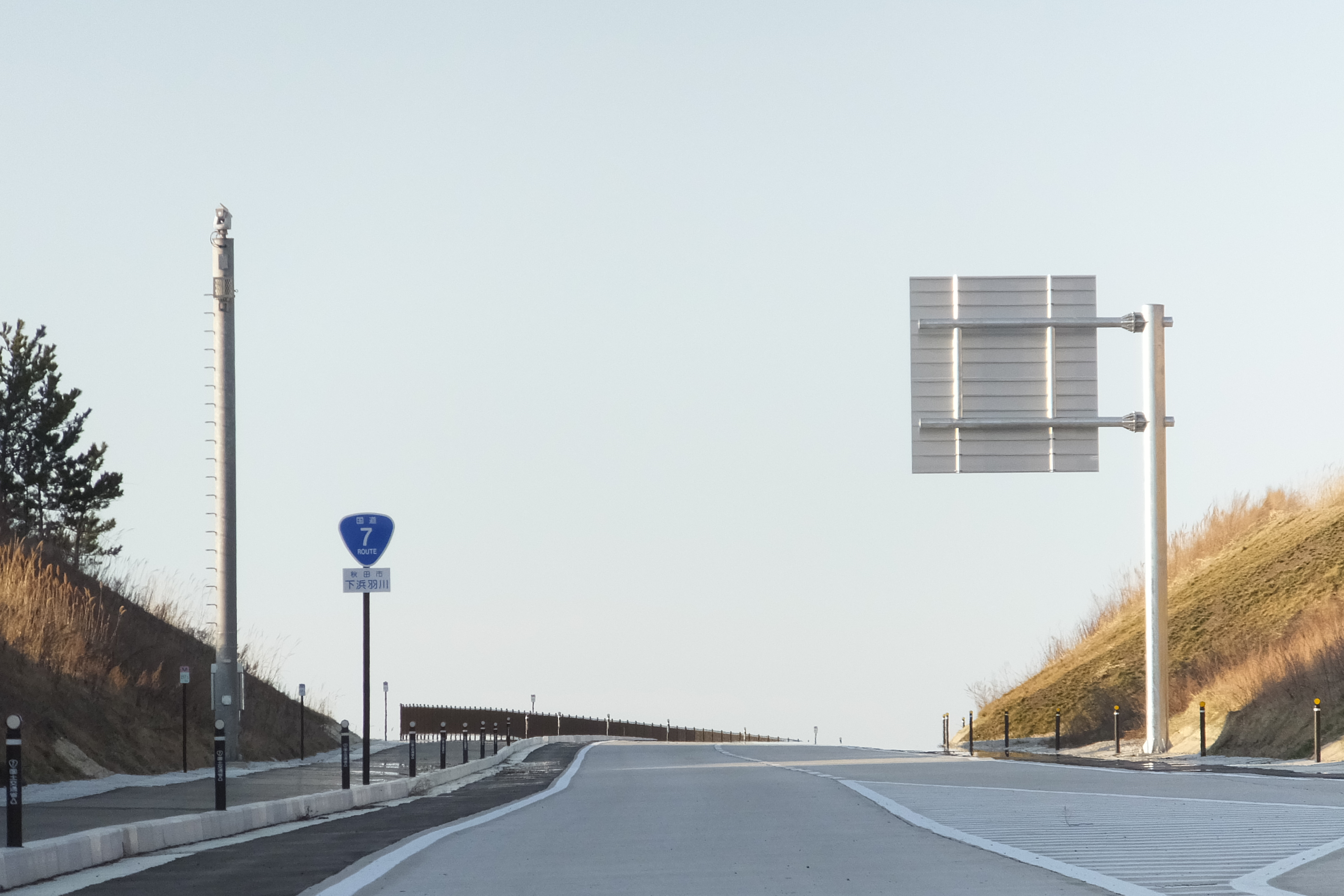 下浜工業団地入口付近から秋田市方向を望む（交差する市道より）